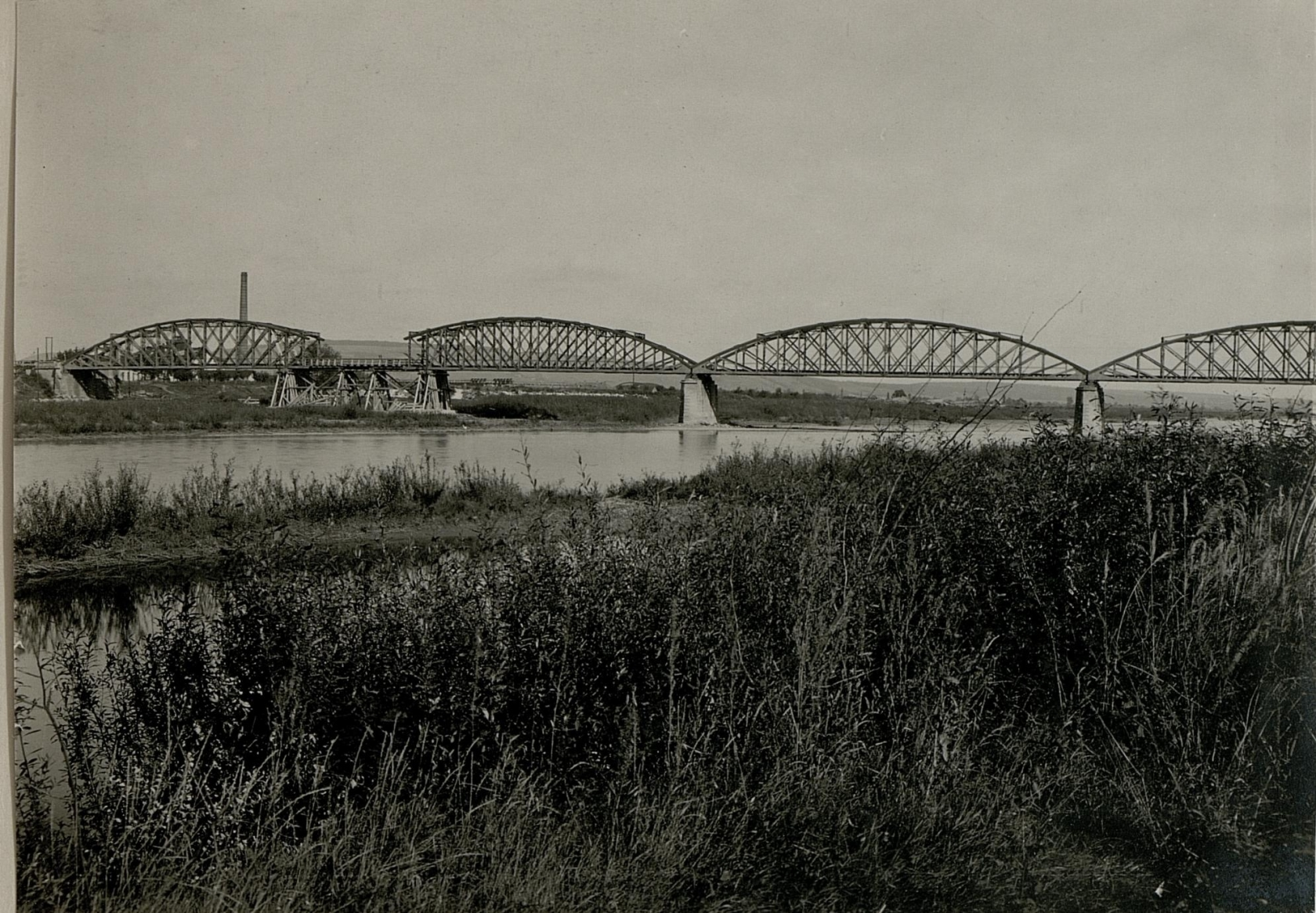 Eisenbahnbrücke Czernowitz